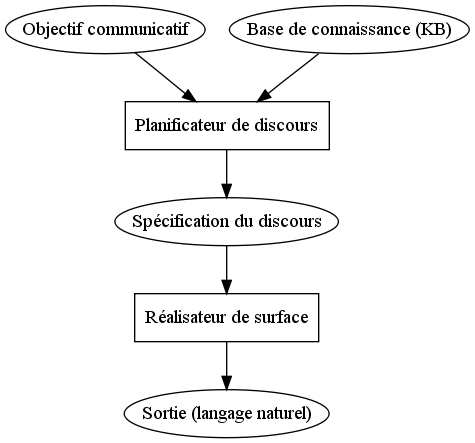 Architecture NLG